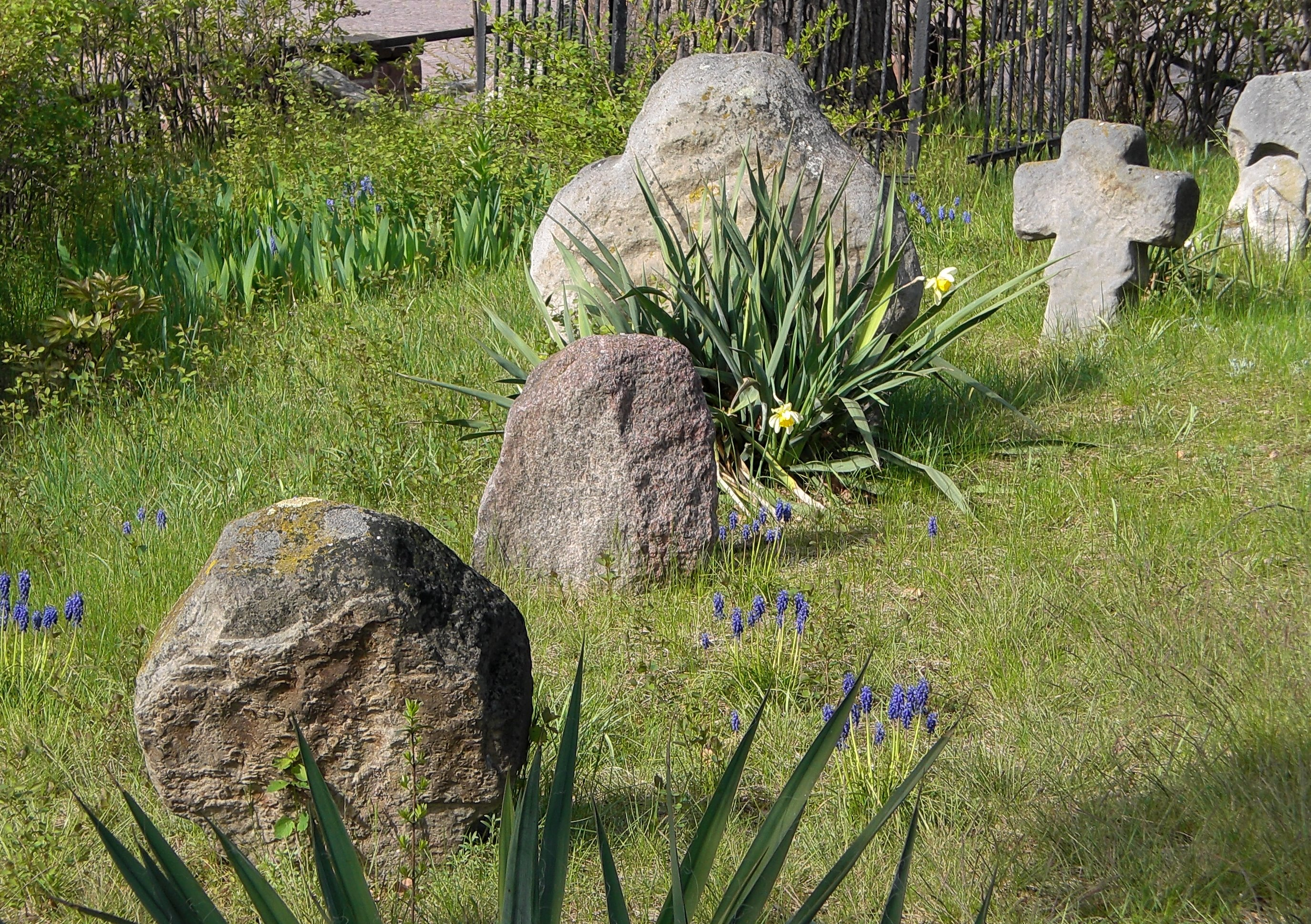 Die Sechs Steine in Ilberstedt, Sachsen-Anhalt